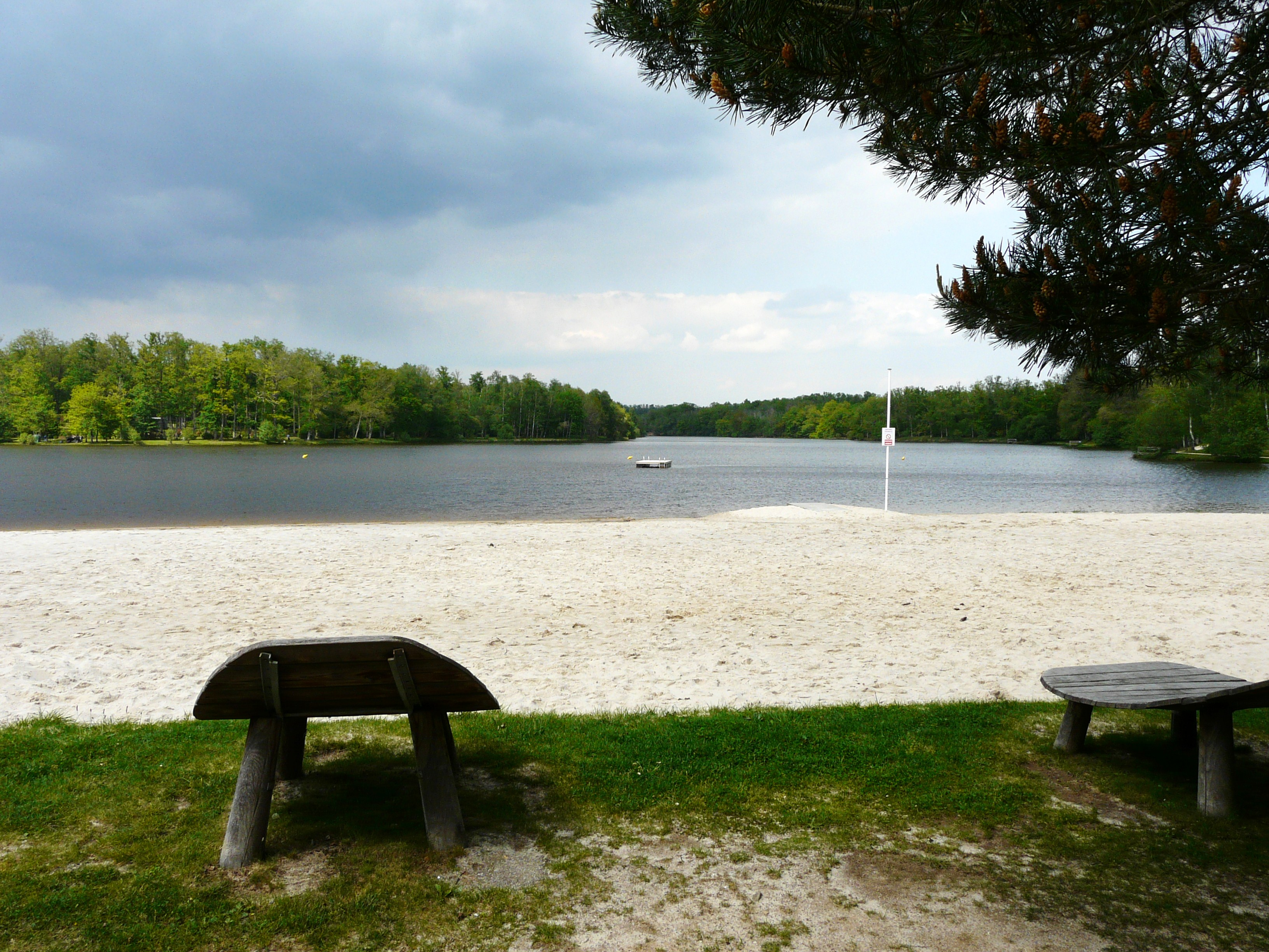 La plage de l'étang de Saint-Estèphe, Dordogne, France.